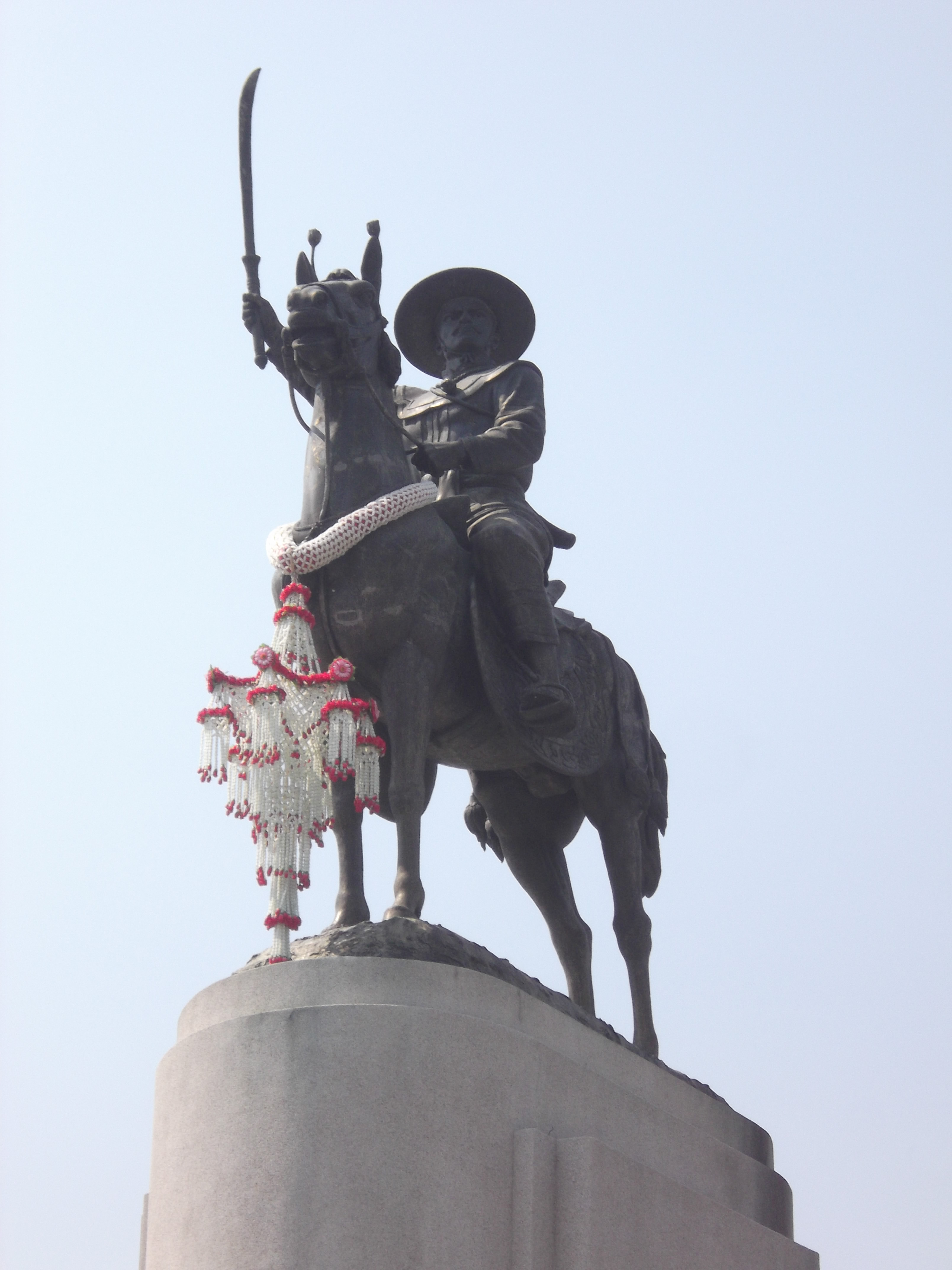 พระบรมราชานุสาวรีย์สมเด็จพระเจ้ากรุงธนบุรีและวงเวียนใหญ่